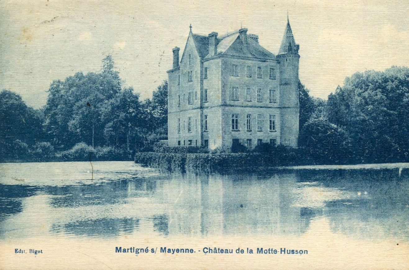 Carte postale - Martigné - S/Mayenne. Château de la Motte-Husson